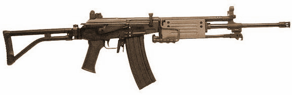 Israeli-Made Galil-Type Assault Rifle